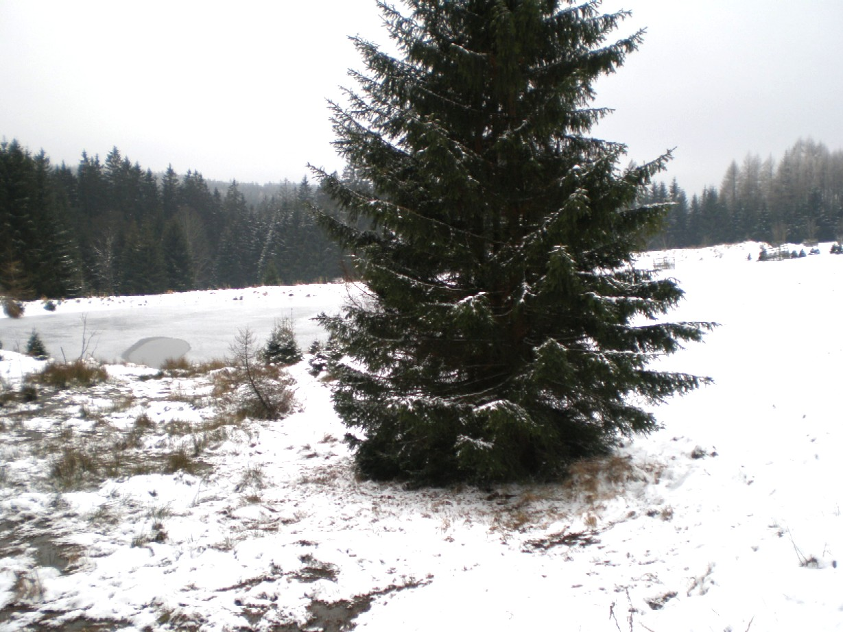 Vodní nádrž nedaleko bývalé myslivny Bor v Třítrubeckém údolí